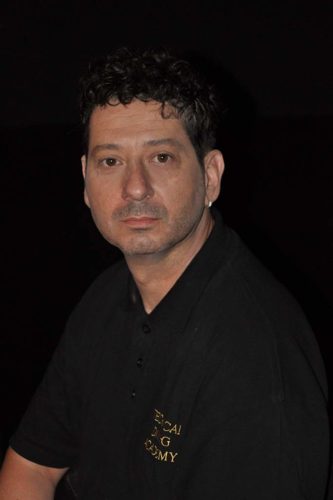 Dejan Matić, glumac